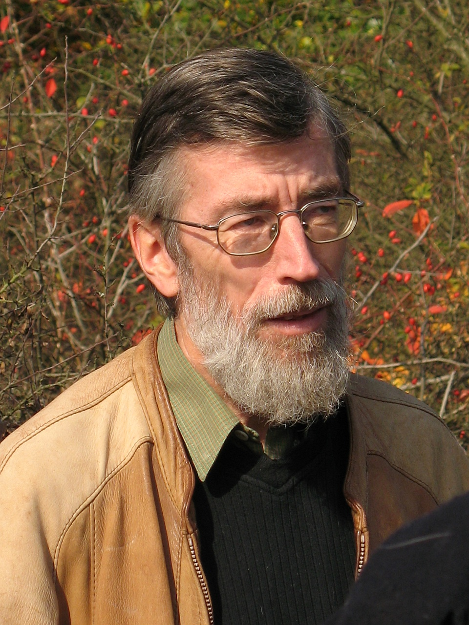 Porträt von Rolf Schilling